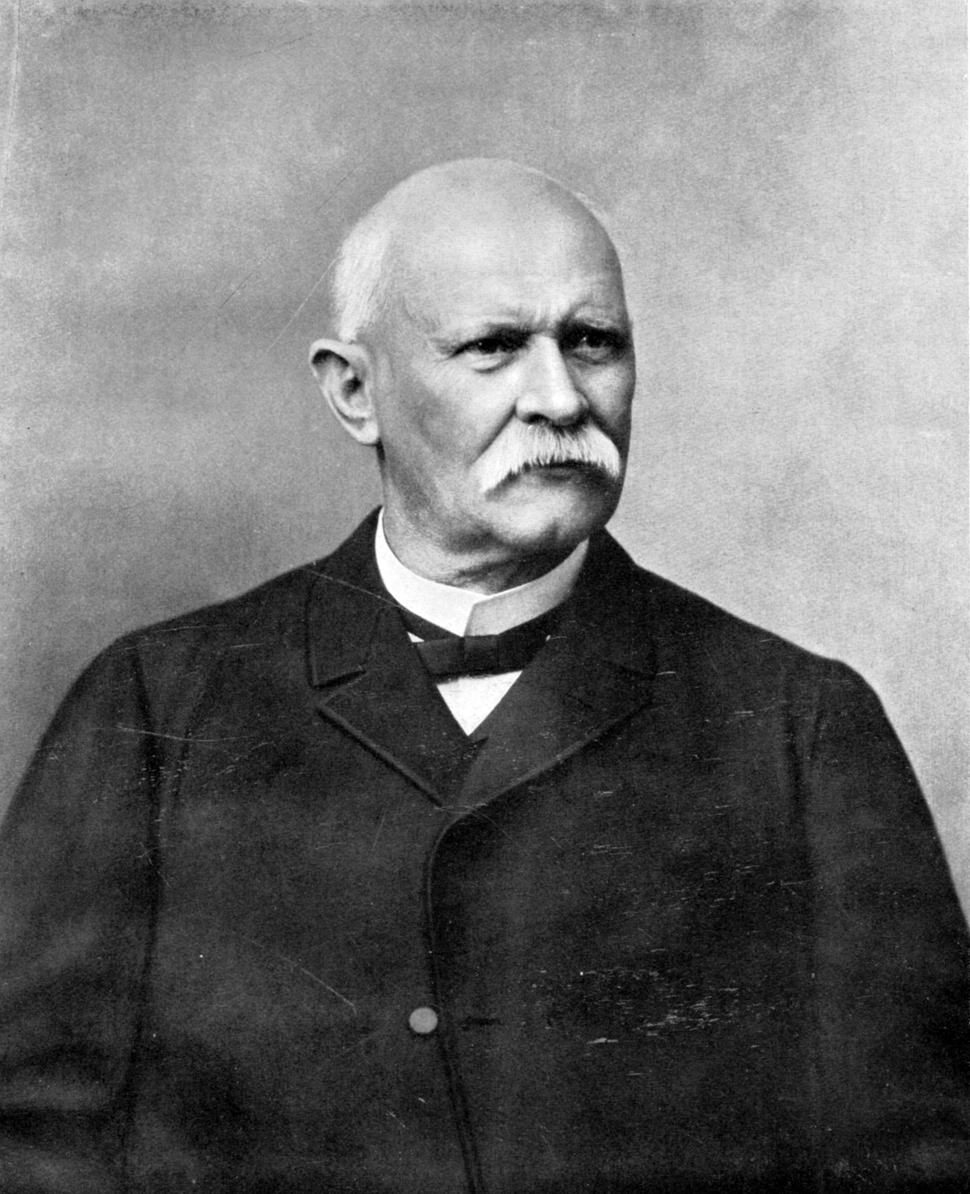 Bundesrat Emil Welti